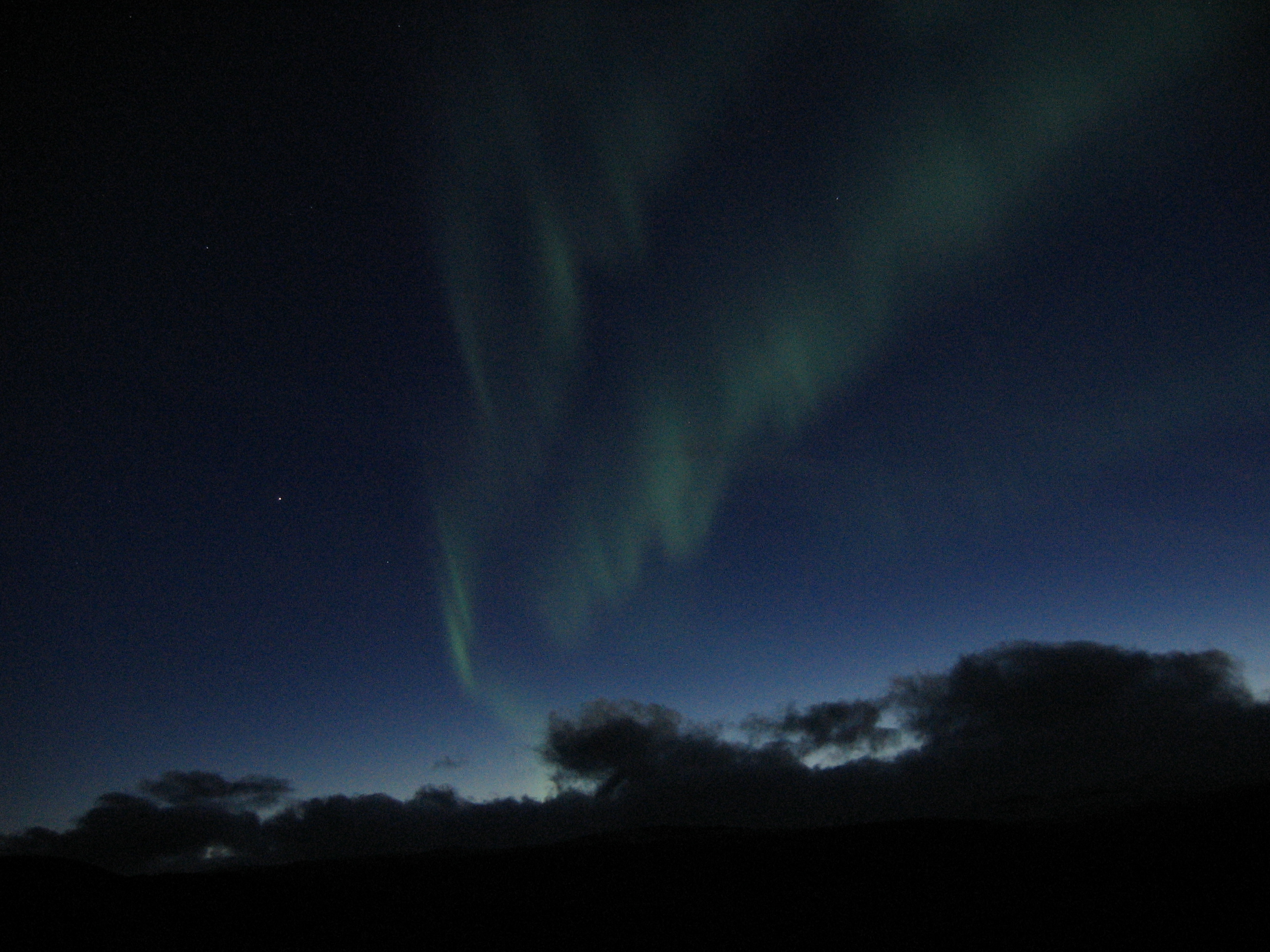 Picture taken at Tältlägret, near Abisko, Kiruna Kommun, Lappland, Norrbotten, Sweden.